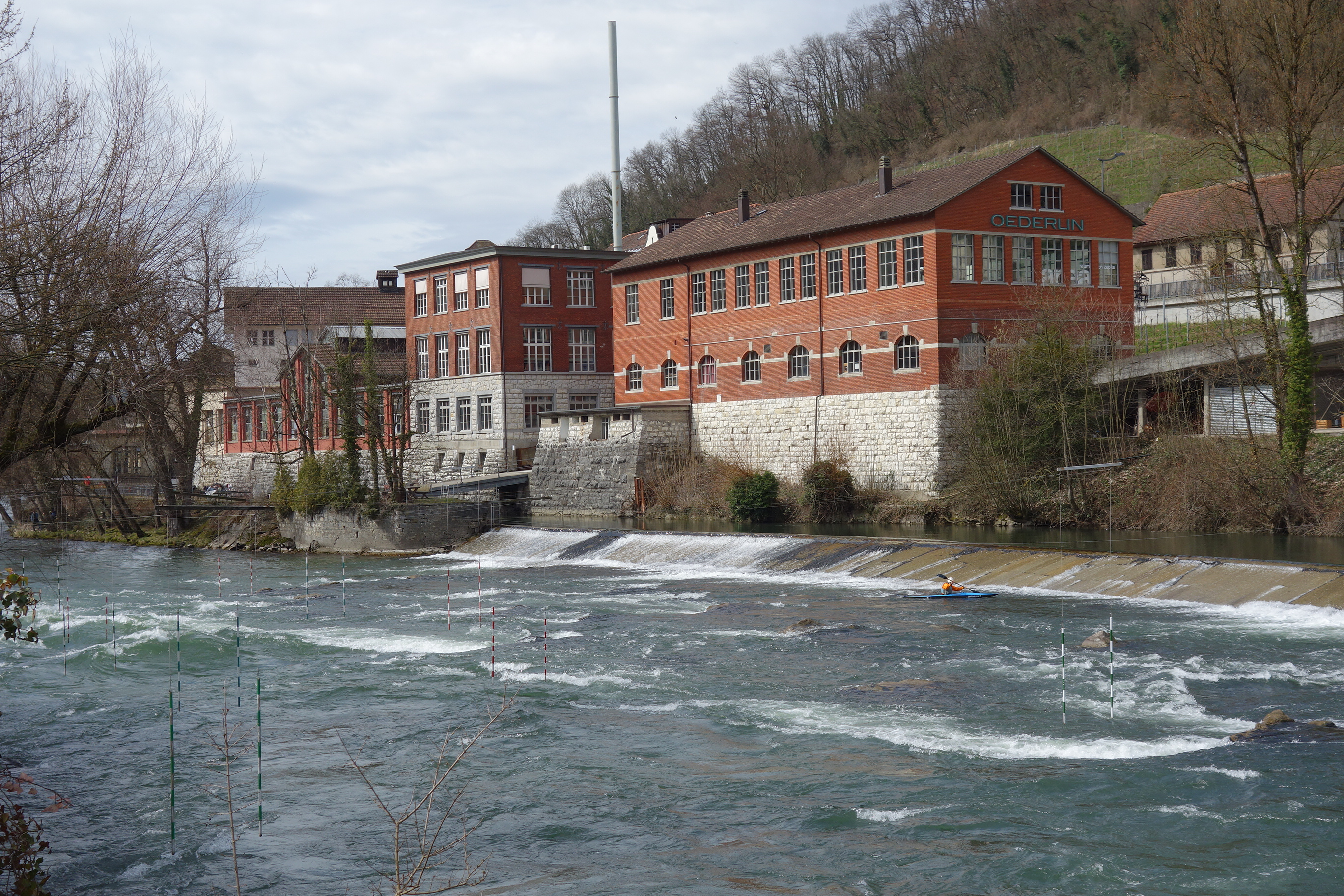 Oederlin AG, Baden AG, Schweiz